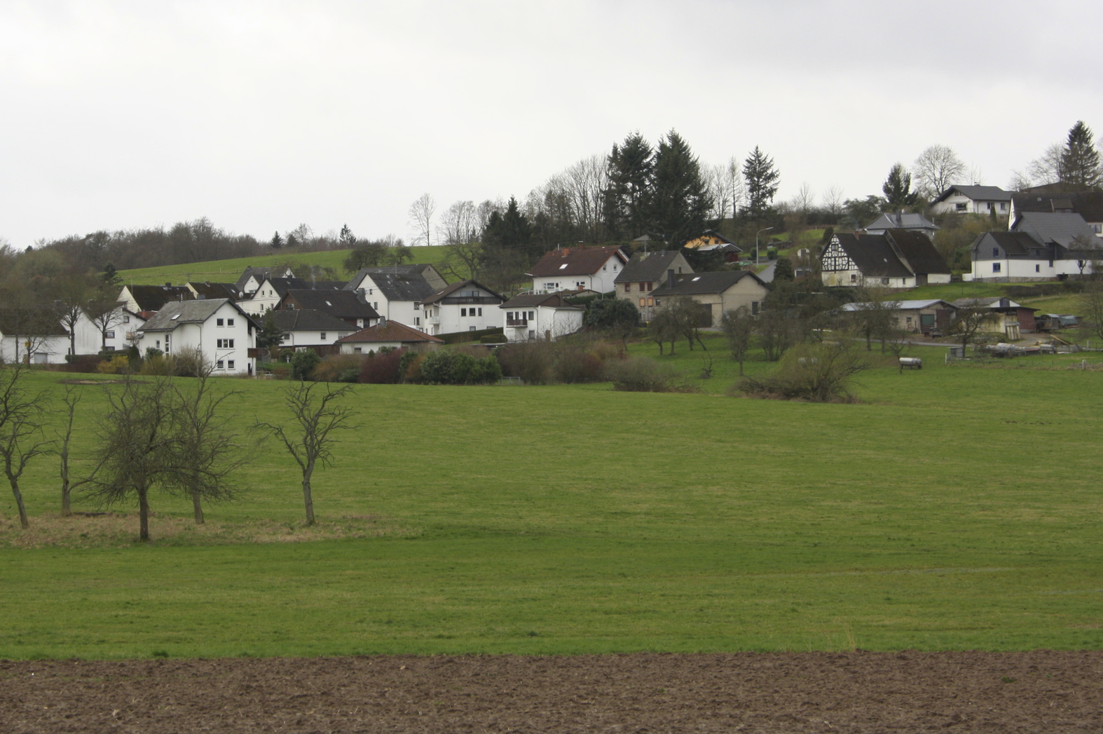 Ewighausen, Westerwaldkreis, Rheinland-Pfalz, Deutschland